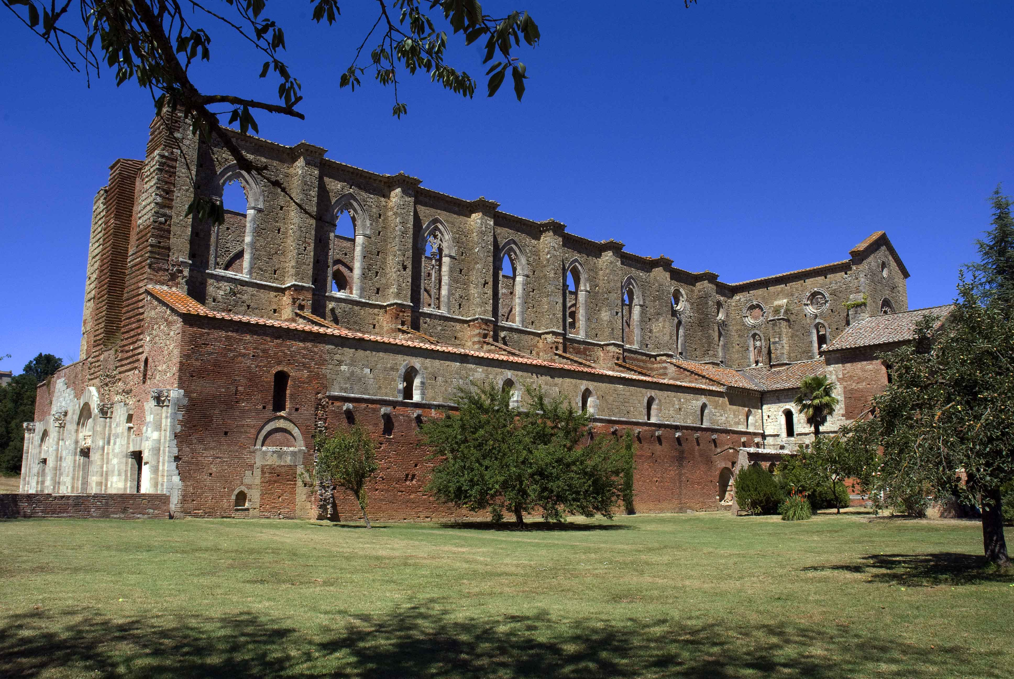 lato destro dell'abbazia di san galgano (Chiusdino)